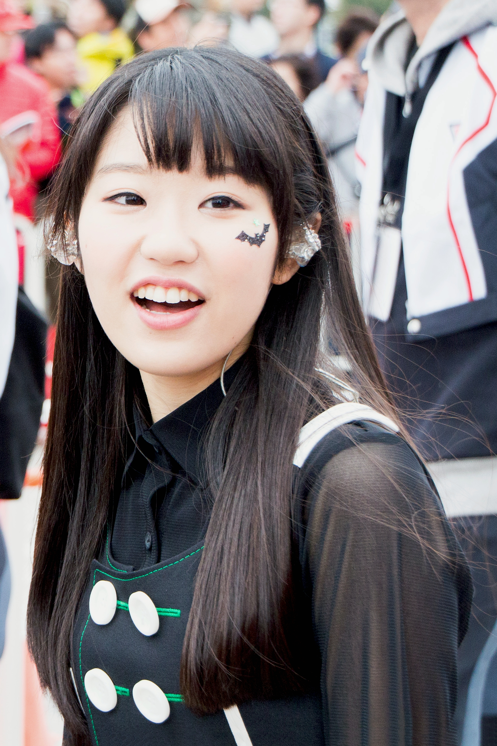 T-SPOOK 2016 東山奈央 (ワルキューレ)